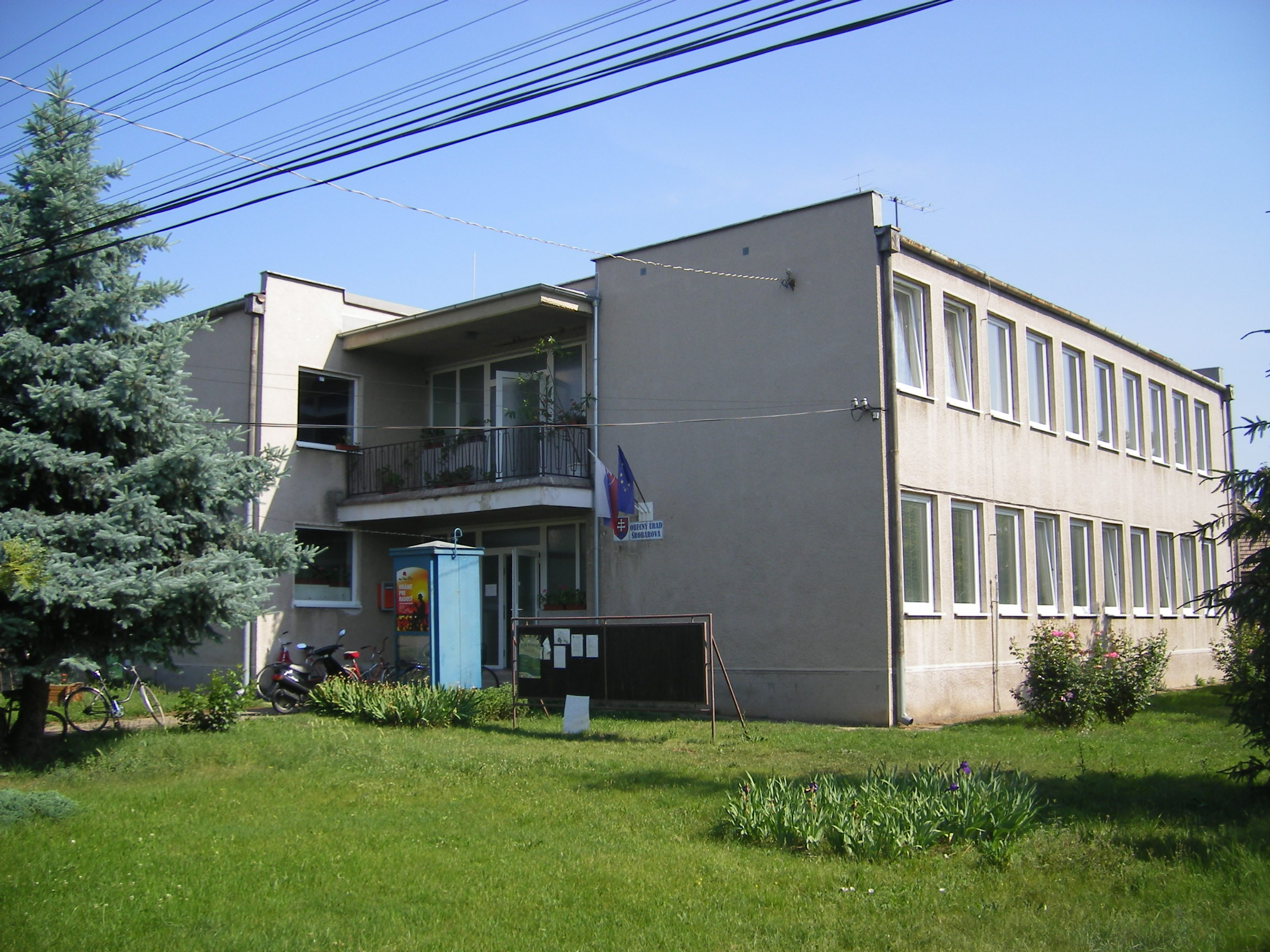 Szilasháza - községi hivatal